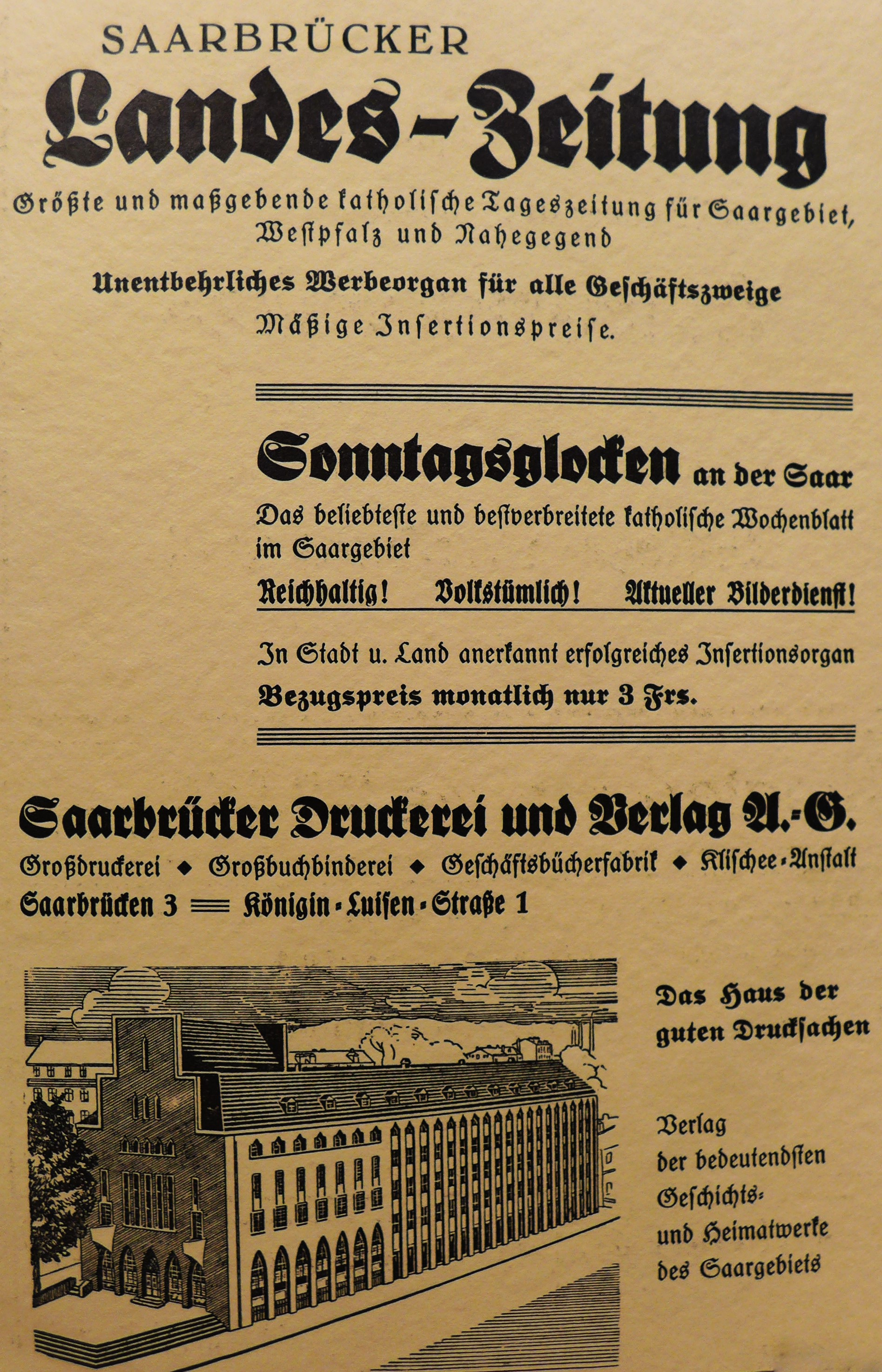 Annonce der Saarbrücker Landeszeitung mit einer Zeichnung des Verlagsgebäudes in Saarbrücken-St. Johann (175 Jahre Pfarrkirche St. Johann, Saarbrücken 1933)